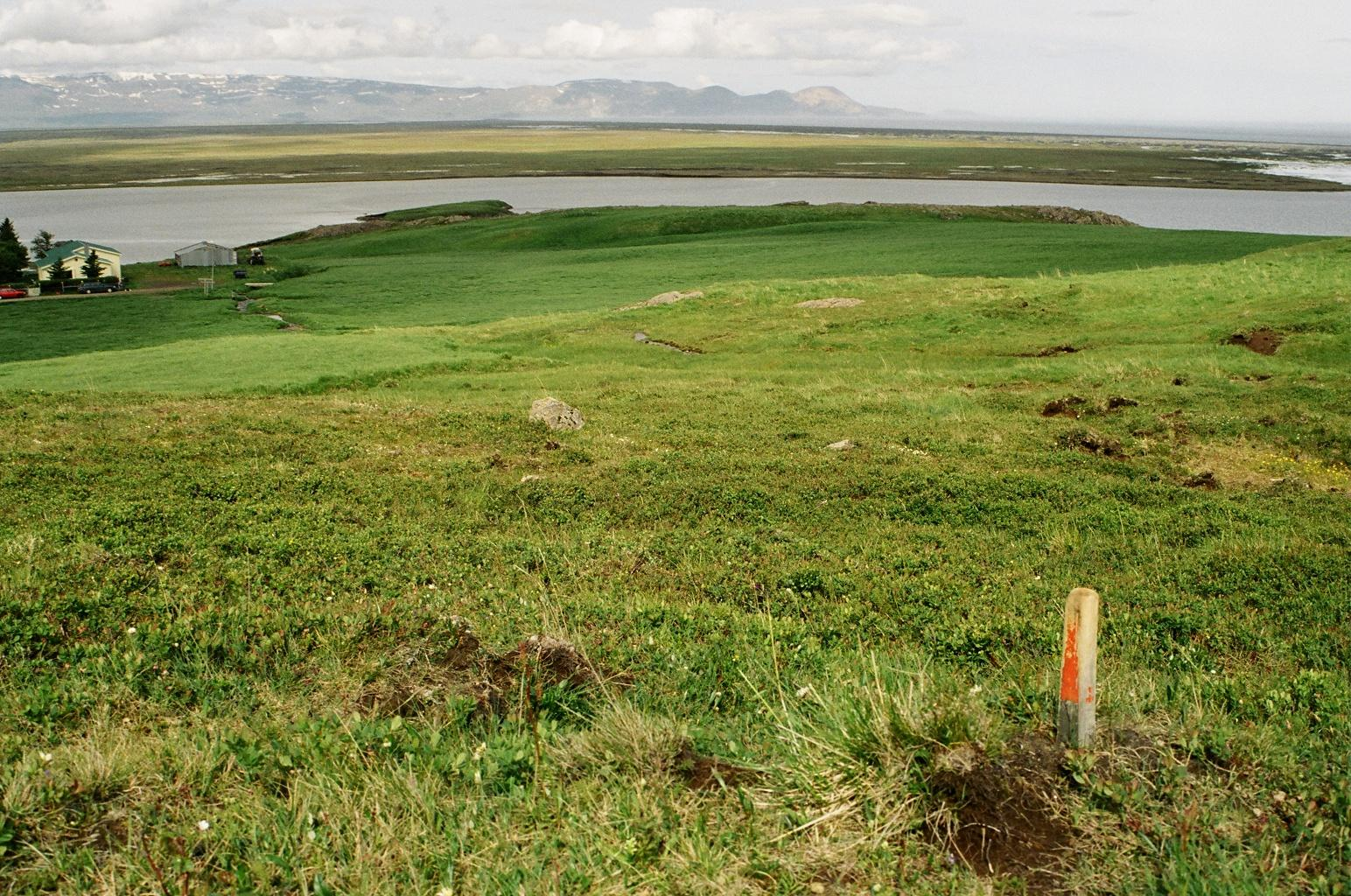 Selbst fotografiert, Juli 2005, GNU-FDL Die Bucht Héradsflói in Nordostisland, aufgenommen v. d. Str. nach Bakkagerdi, im Hintergrund der Berg Kollamúli, im Vordergrund der Fluss Lagarfljót. Reykholt 00:13, 5. Aug 2005 (CEST)